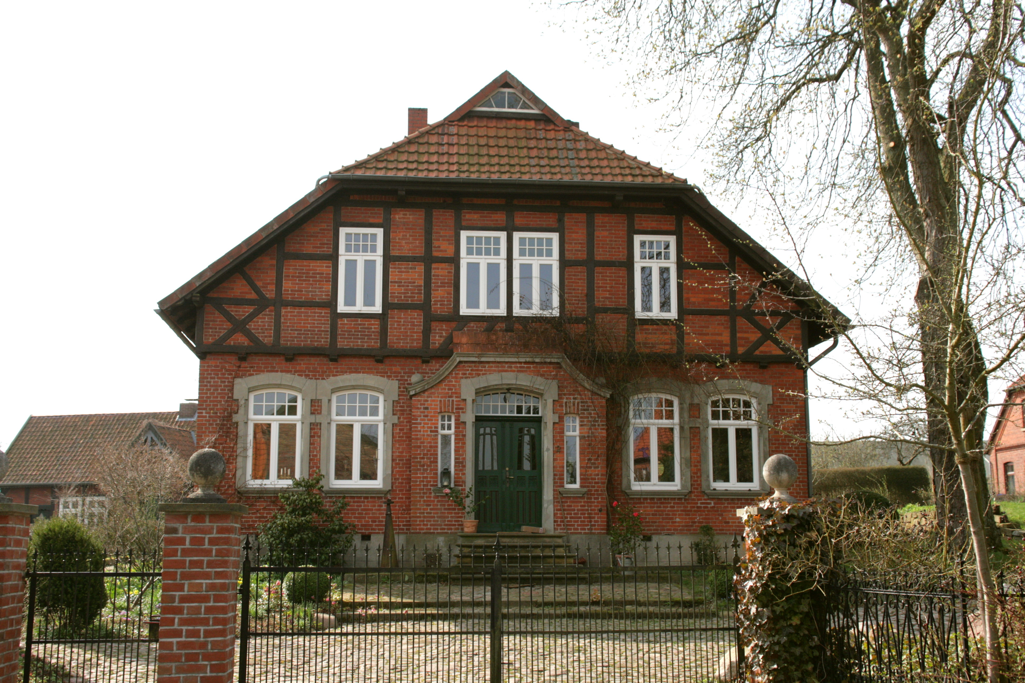 Ortsmitte, nahe der St.-Georg-Kirche in Barum (Landkreis Uelzen)